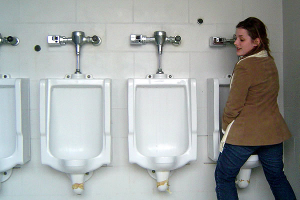 Female urinal use